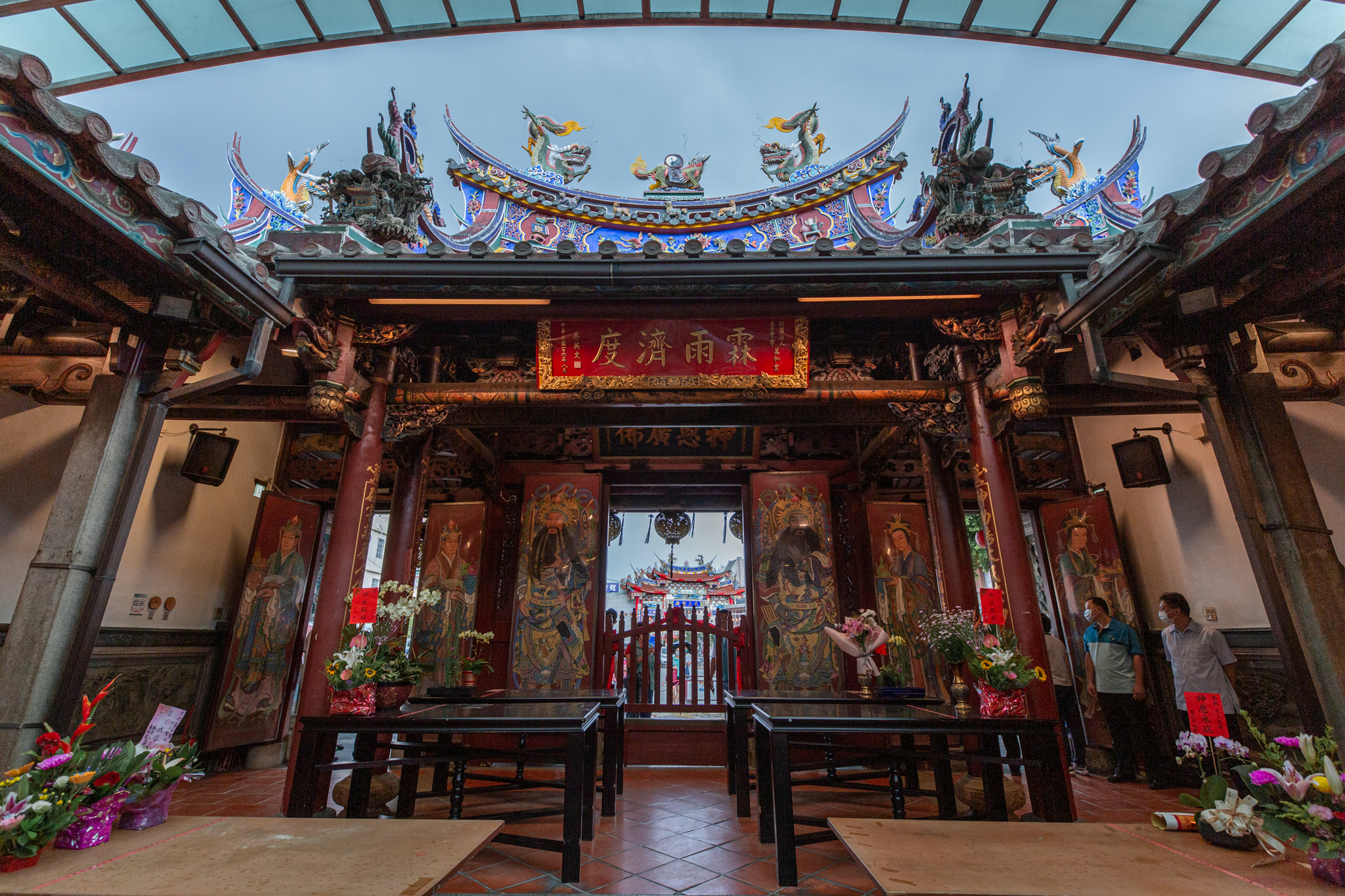 2020. 08.15 總統參拜「南屯萬和宮」